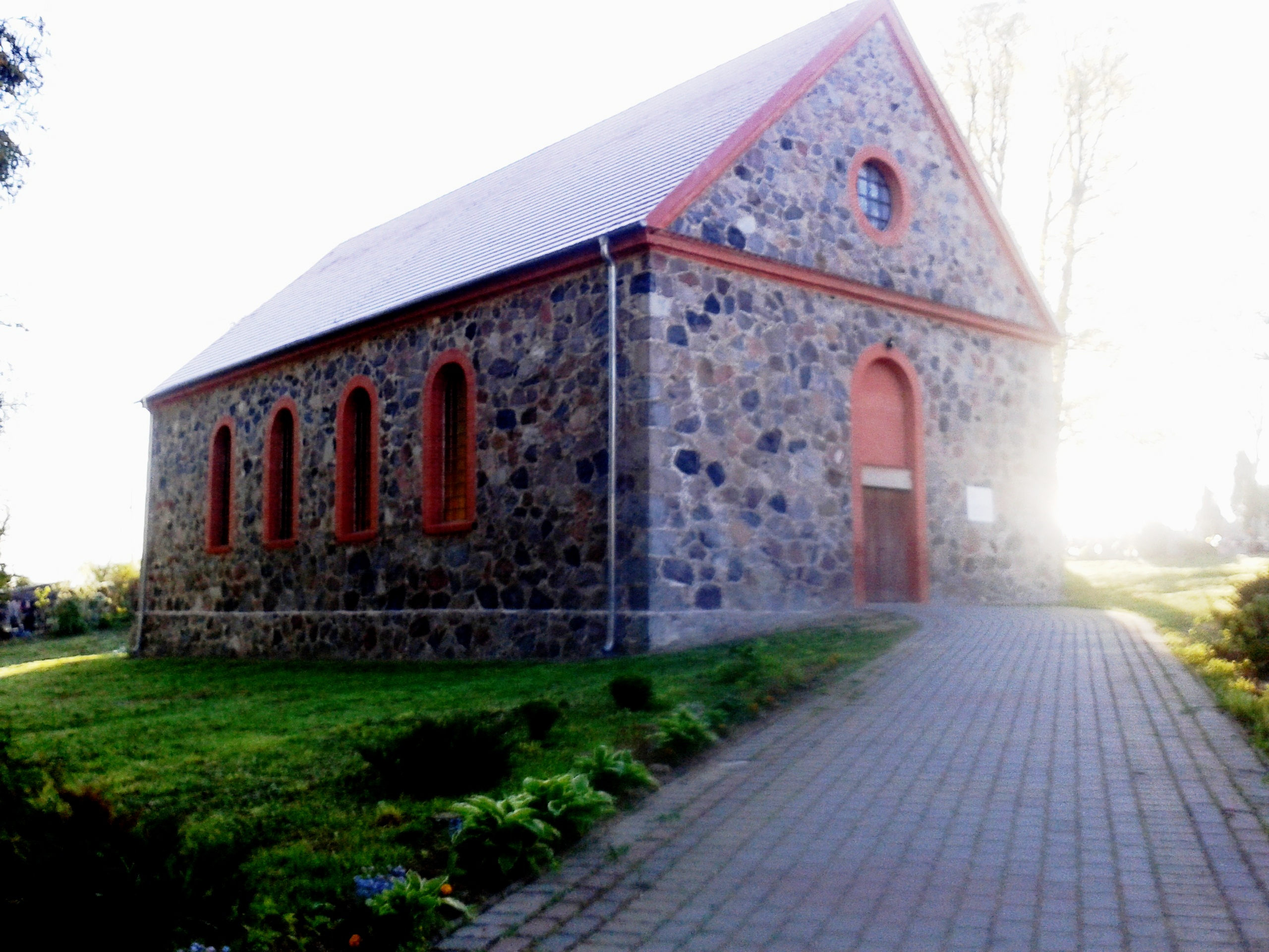 Kościół pw. Najśw. Serca Pana Jezusa w Zajezierzu (gm. Łobez)